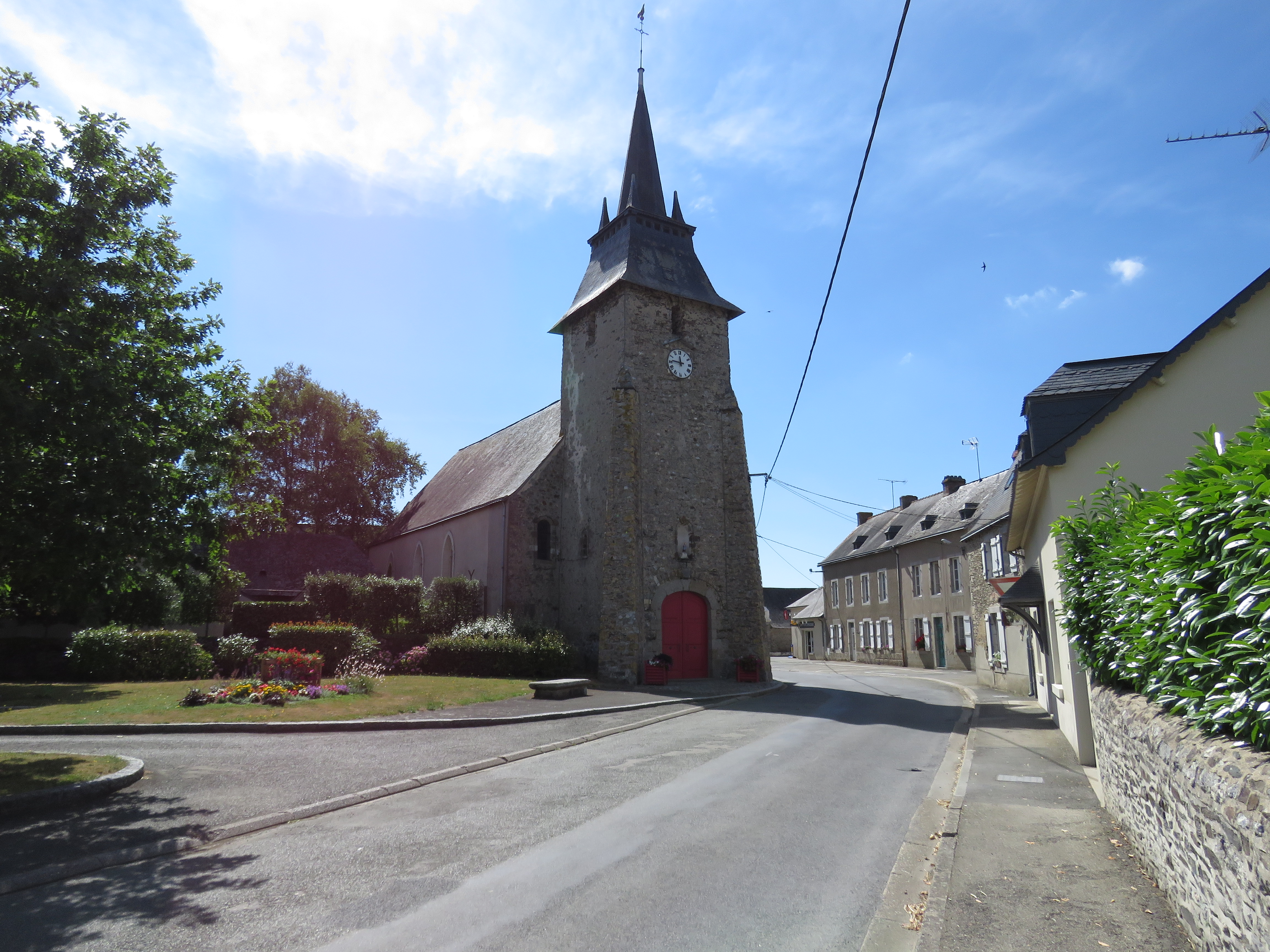 Façade ouest de l'église